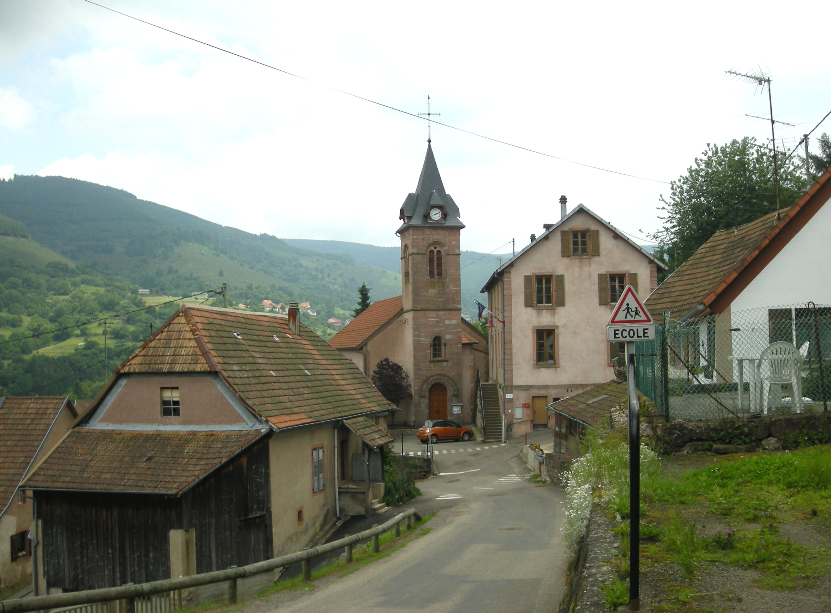 Eglise luthérienne de Neuviller-la-Roche (Bas-Rhin)